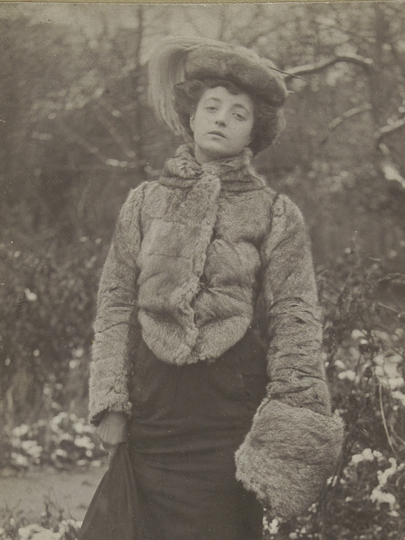 Maria Dulęba, ok. 1900 r.